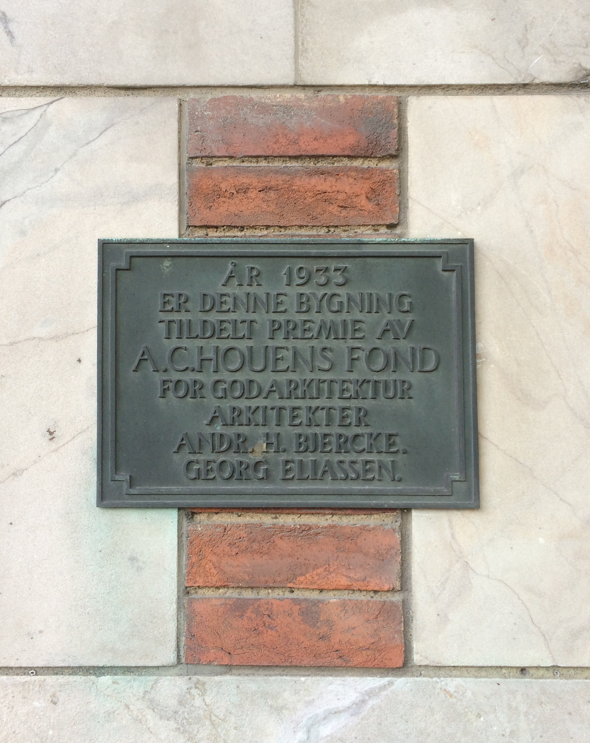 Arkitektene bak Oslo lysverkers bygning ved Solli plass ble tildelt Houens fonds diplom for 1933.